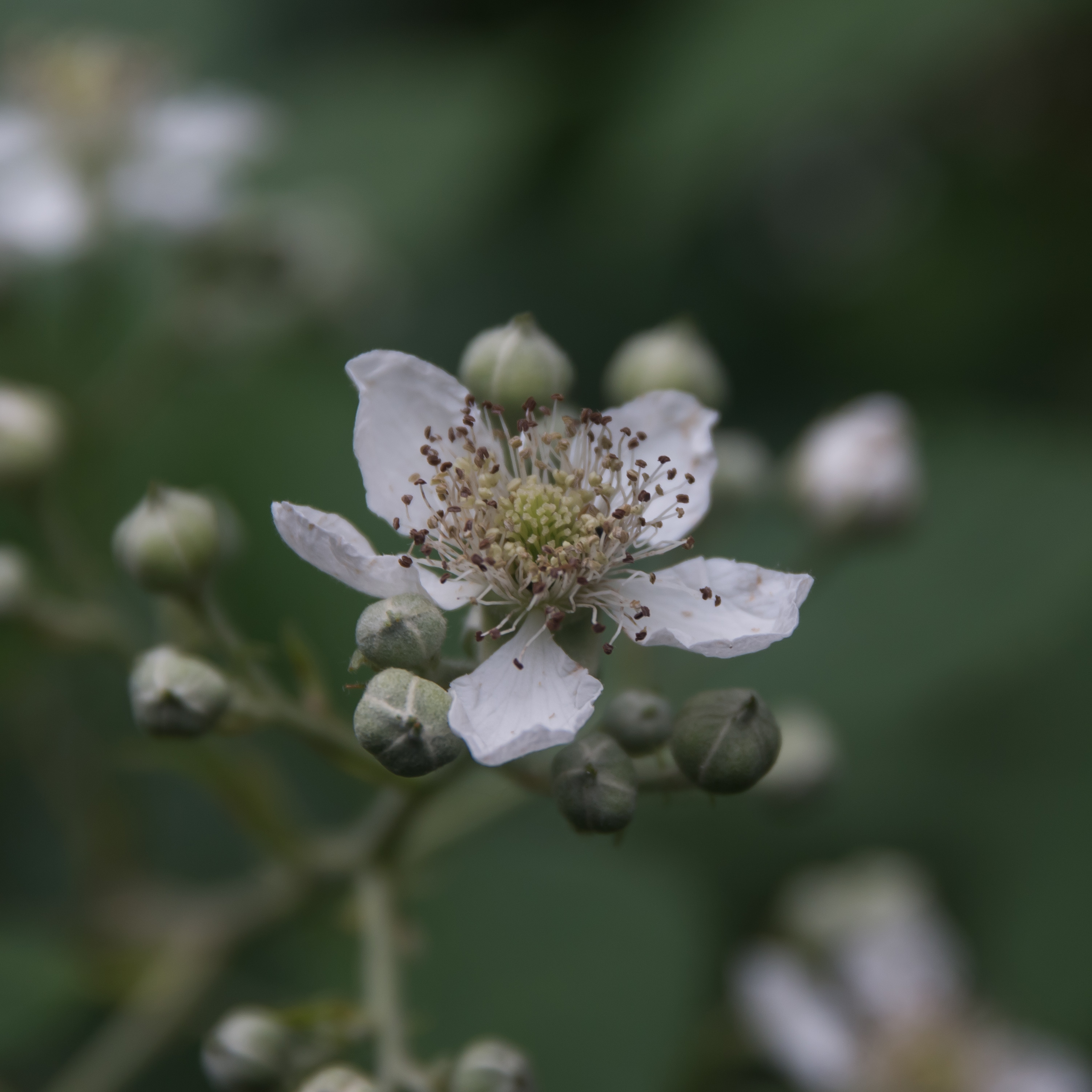 Blackcherry